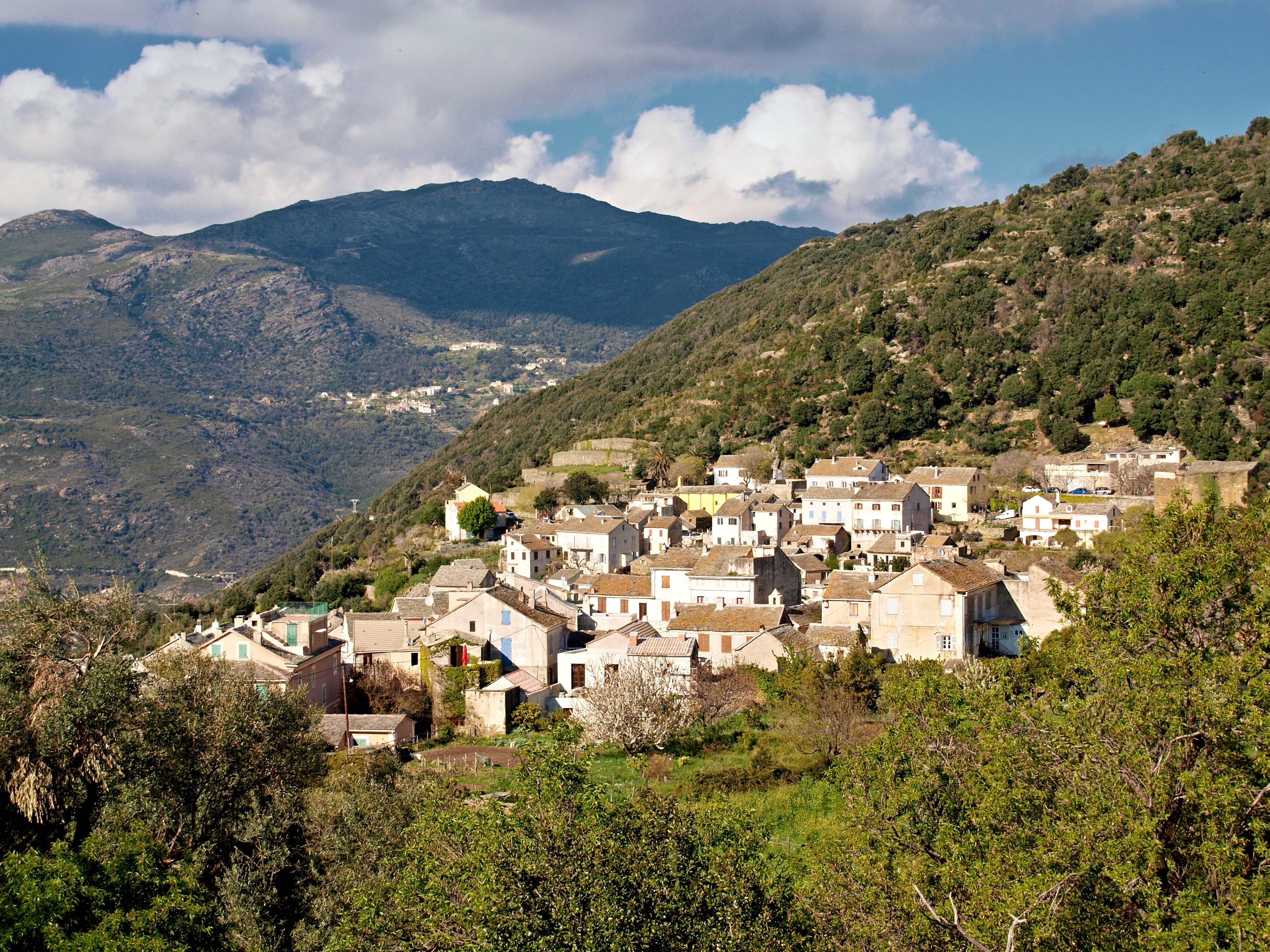 Canari (Corsica - Hameau de Vignale